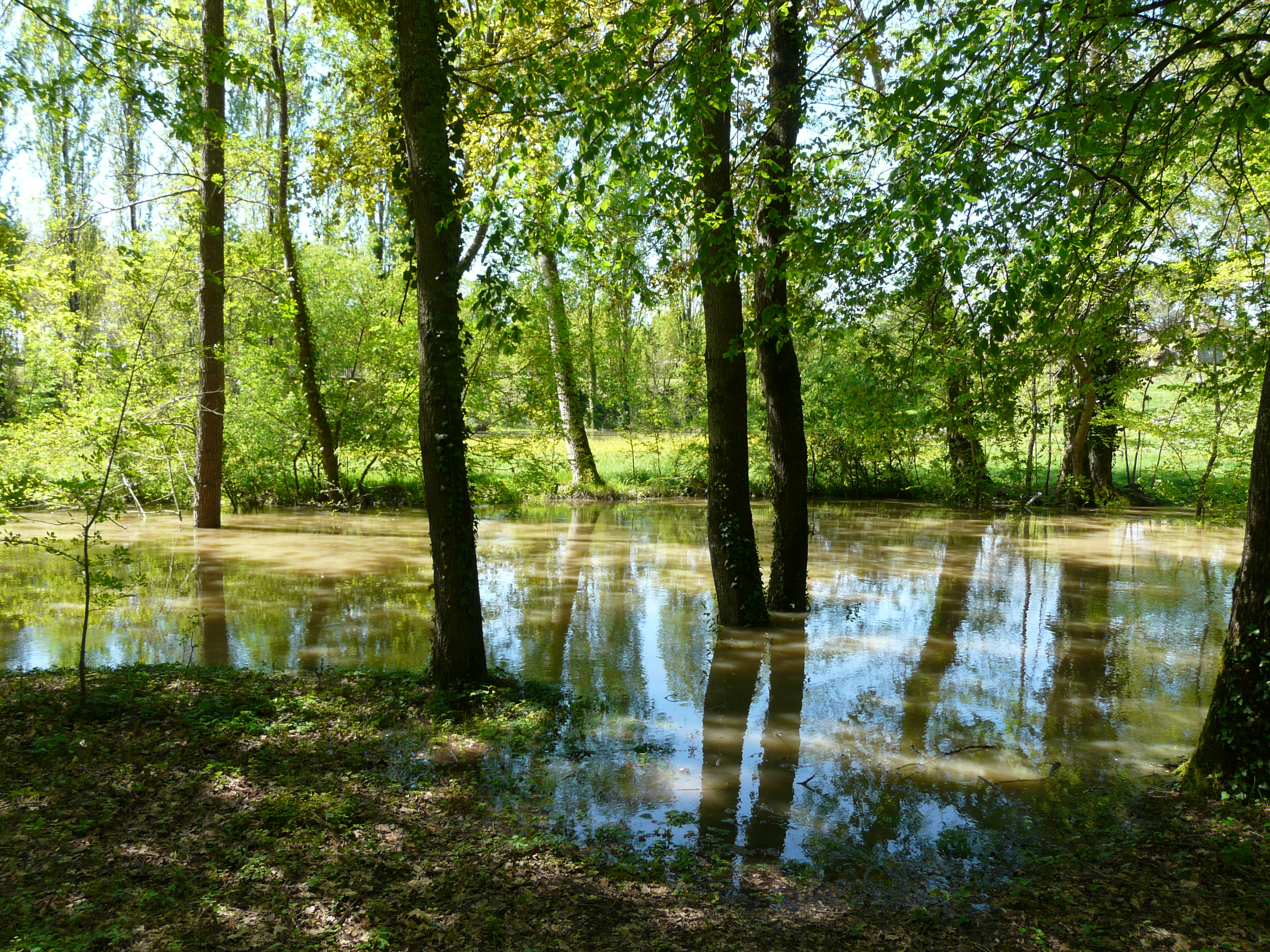 Le Barailler en crue, entre le pont de la route du Dry et le pont de la route départementale 32. Il marque la limite entre Saint-Pierre-d'Eyraud (premier plan) et Le Fleix (en rive opposée), Dordogne, France.